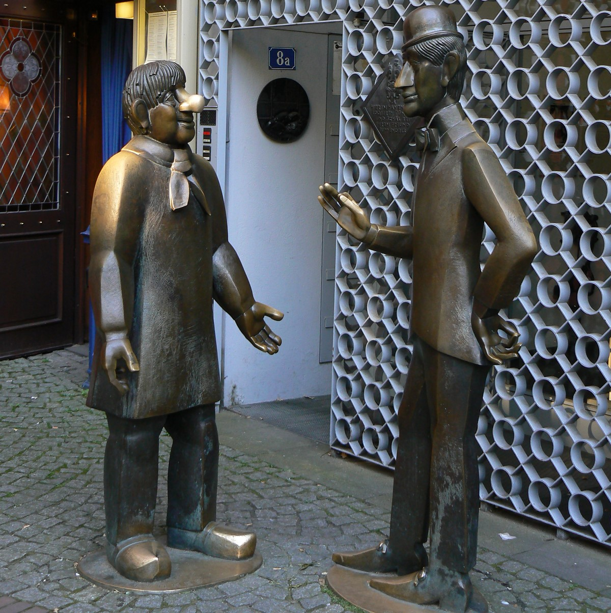 Skulptur Tünnes-und-Schäl-Denkmal von Wolfgang Reuter (1974).